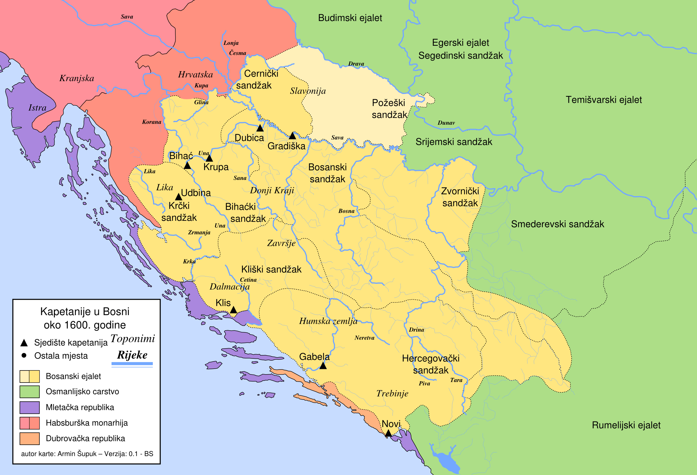 Kapetanije oko 1600. godine